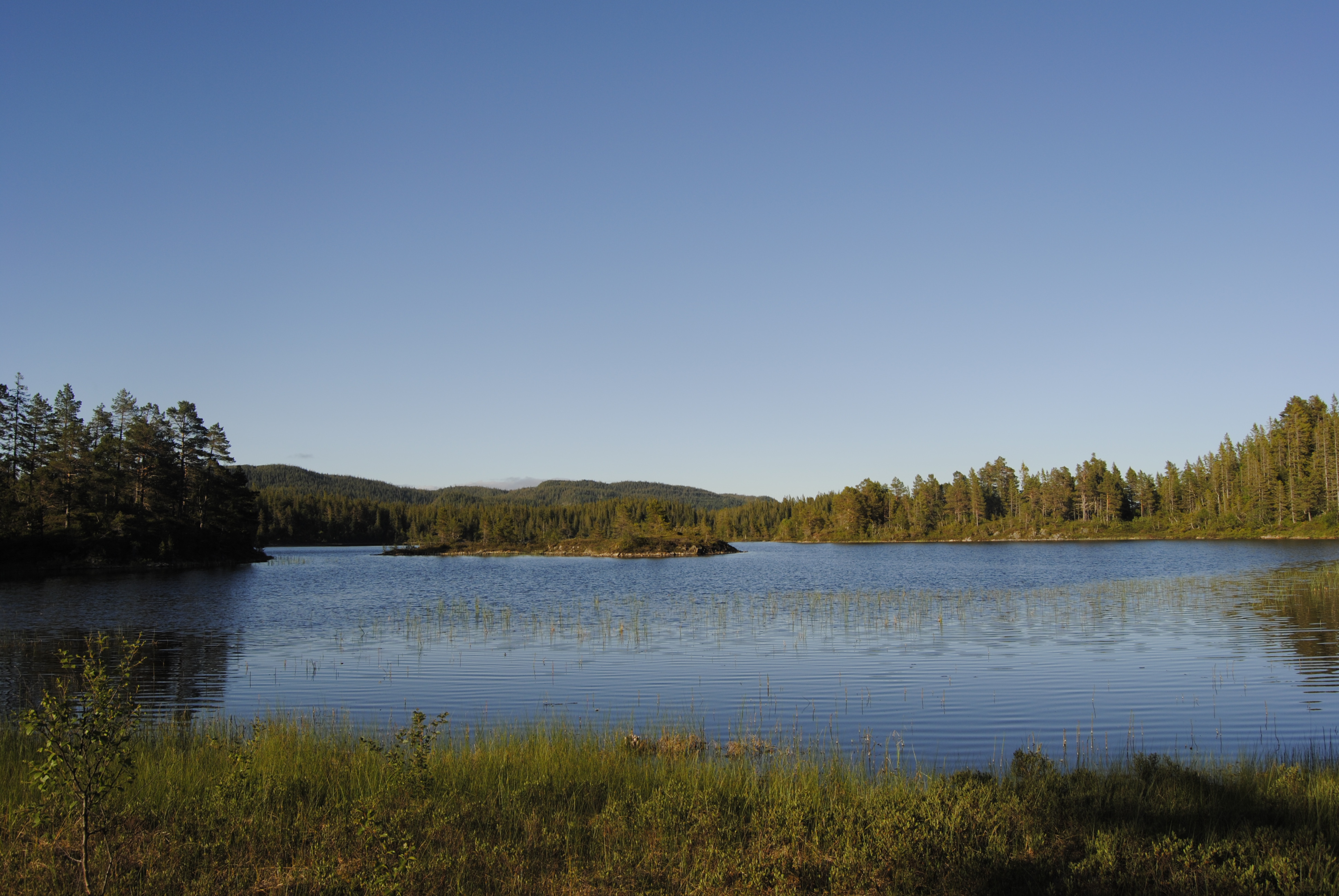 Vålvatnet i Rissa, Sør-Trøndelag. Juli 2015. Foto: Stian Tørstad